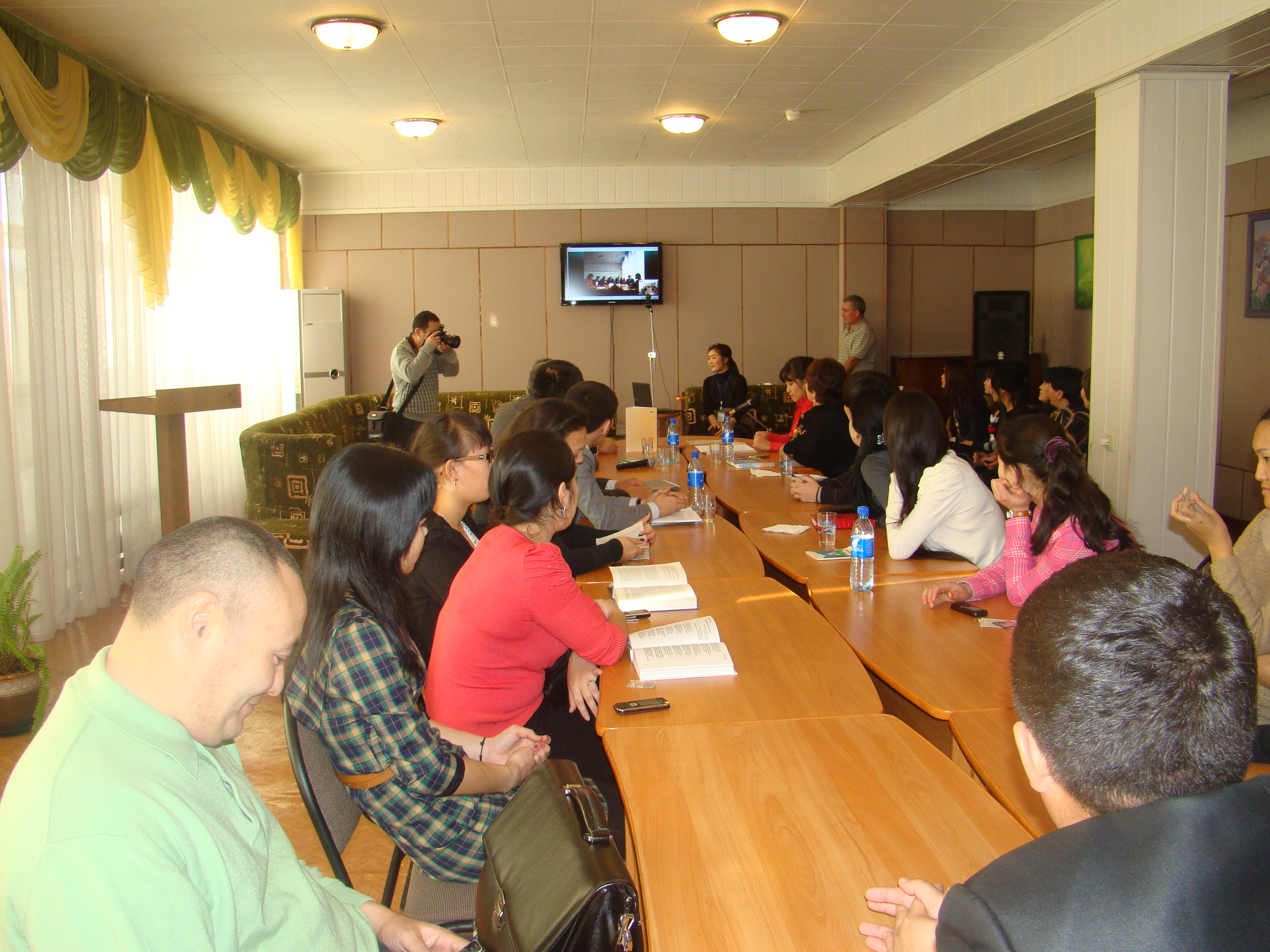 Отдел выставочно-массовой работы (Костанайская областная универсальная научная библиотека им. Л. Н. Толстого)